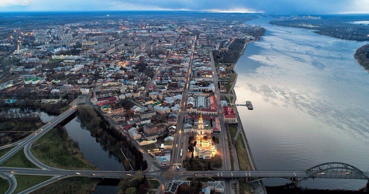 Вид на Рыбинск. Правобережная центральная часть города